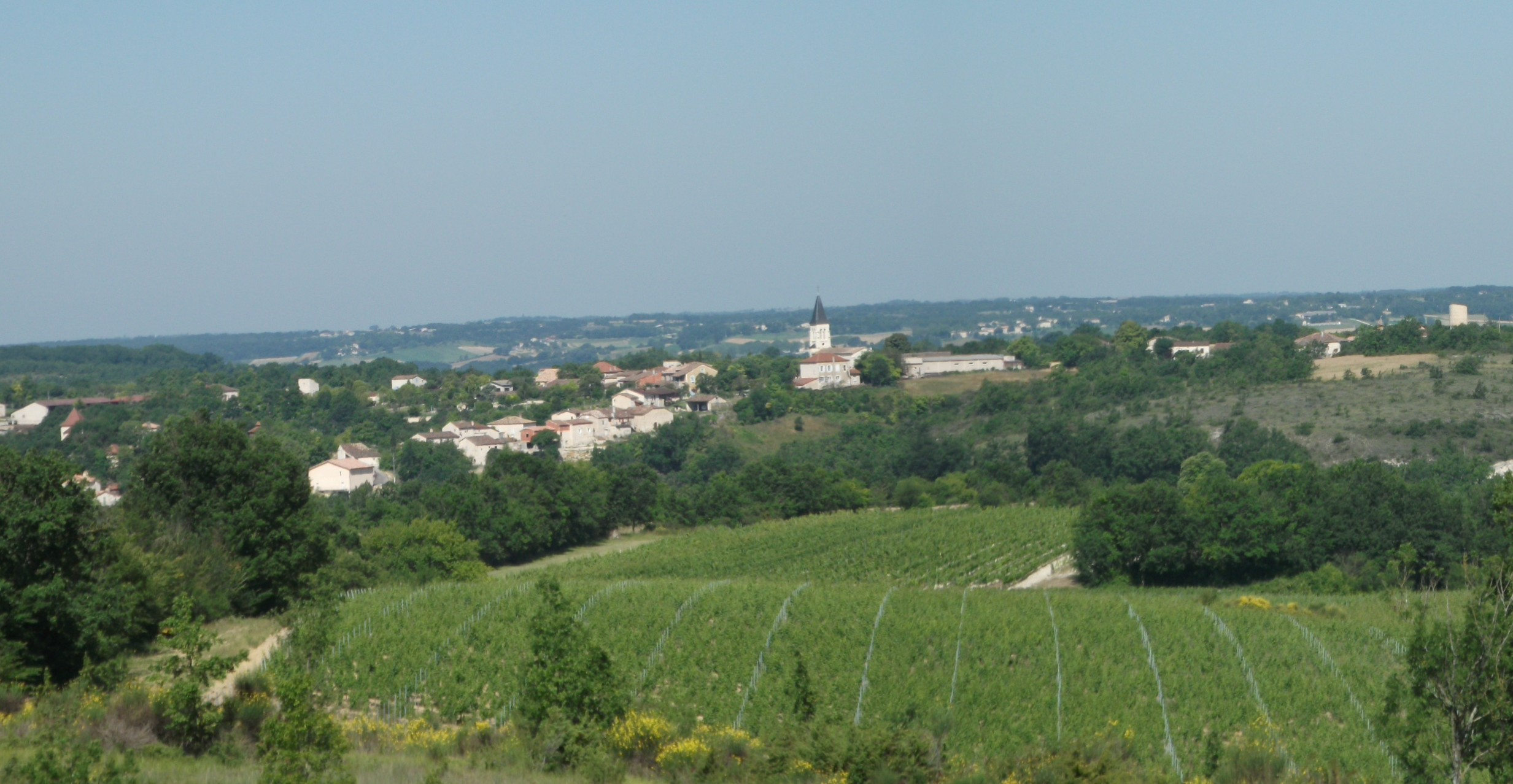 Vue panoramique de Belfort du Quercy